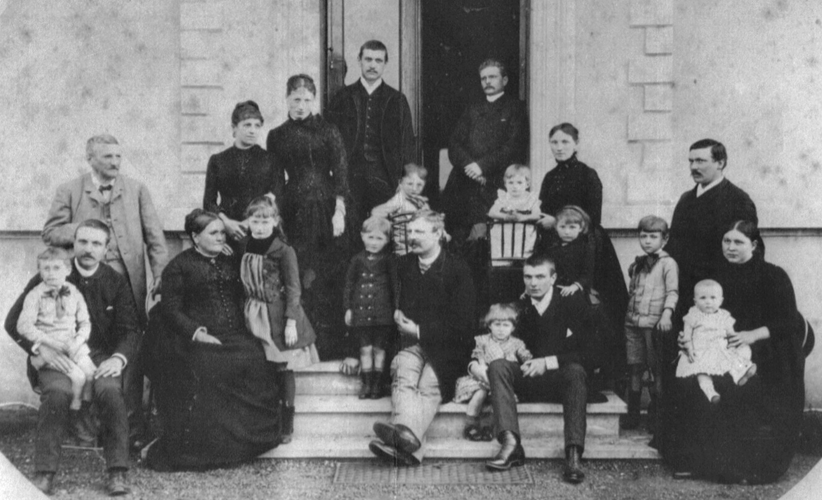 Leden van de familie Regout (tak Petrus II Regout) gefotografeerd voor Villa Canne in Maastricht. Petrus II (staande, links) was directeur van de kristal-, glas- en aardewerkfabriek Petrus Regout & Co. Diverse zonen waren eveneens actief in het familiebedrijf, zoals Pierre III (zittend midden). Zijn broer Jules (staande in de deuropening) richtte de NV Wolindustrie op; een andere broer Alfred (zittend links) de vloertegelfabriek Alfred Regout & Co., later Rema.Afgebeeld zijn v.l.n.r.: 1. Jules Wilhelm Regout; 2. Alfred Hubert Regout; 3. Petrus Alexander Regout; 4. Gertrudis Amélie Regout-Polis (gehuwd met 3); 5. Bertha Regout; 6. Joséphine Bettonville; 7. Louisa Regout-Berger; 8. Pierre Regout; 9. Georges Marie Regout; 10. Léopold Hubert Regout (gehuwd met 6); 11. Petrus Hubert Regout (gehuwd met 7); 12. Jules Joseph Regout; 13. Marie Hubertine Regout; 14. Frederika Regout-Berger (gehuwd met 12); 15. Amélie "Lilly" Regout; 16. Charles Marie Regout; 17. Alice Amélie Regout; 18. Ernest Lambert Regout; 19. Ernest Edouard Regout; 20. Berthe Regout-Vilvoye (gehuwd met 19); 21. Léon Marie Regout.